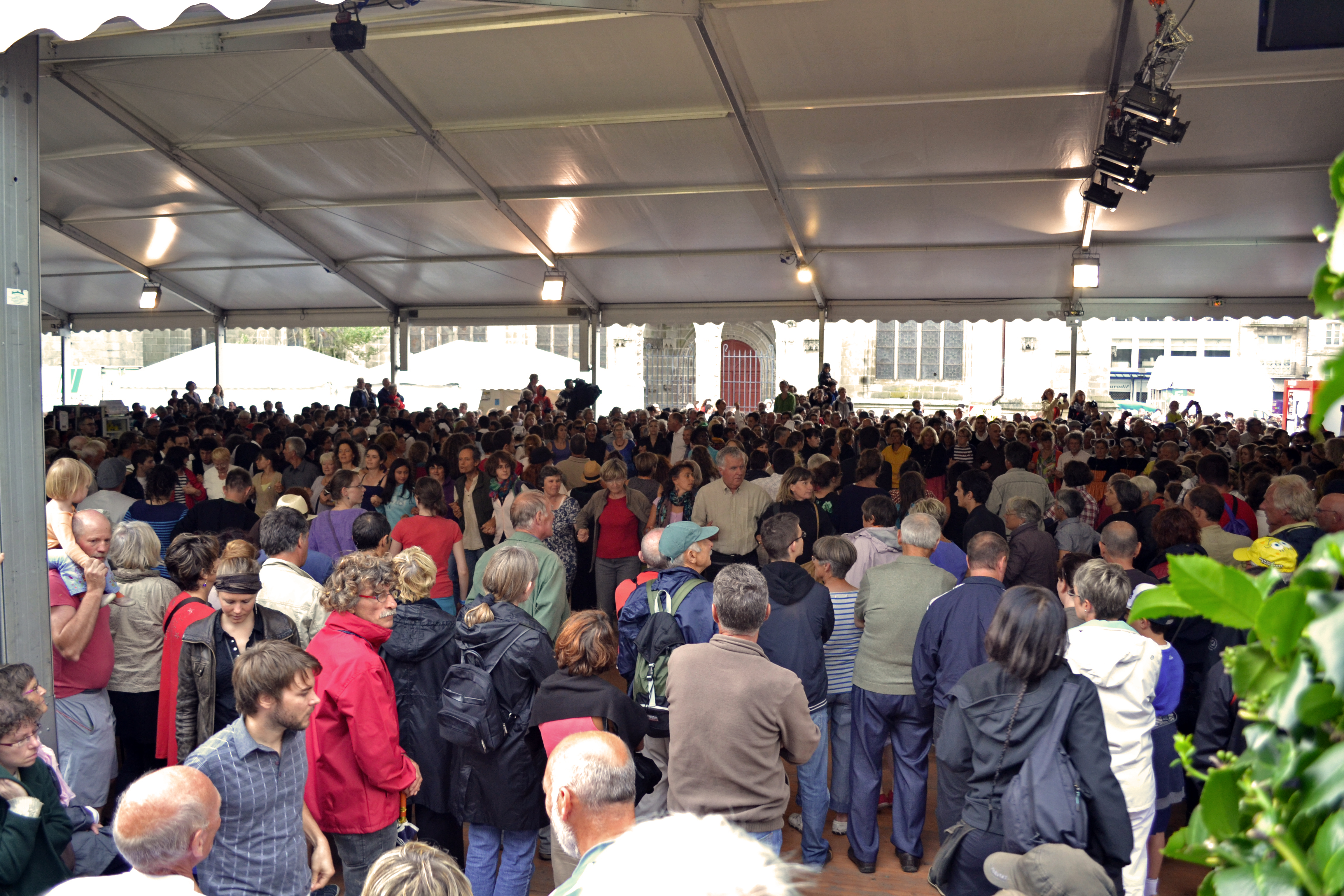 15e Cyber Fest-Noz, diffusé par An Tour Tan, le dimanche 28 juillet 2013 lors du festival de Cornouaille place Saint-Corentin à Quimper.